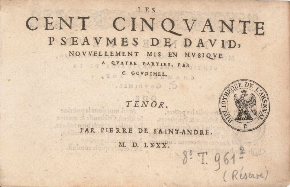 Title page of Goudimel's psalsm "en contrepoint fleuri" (Genève, 1580).